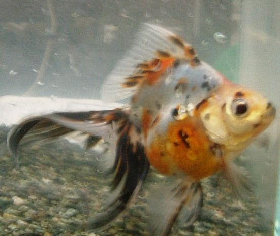 kyariko-ryukin